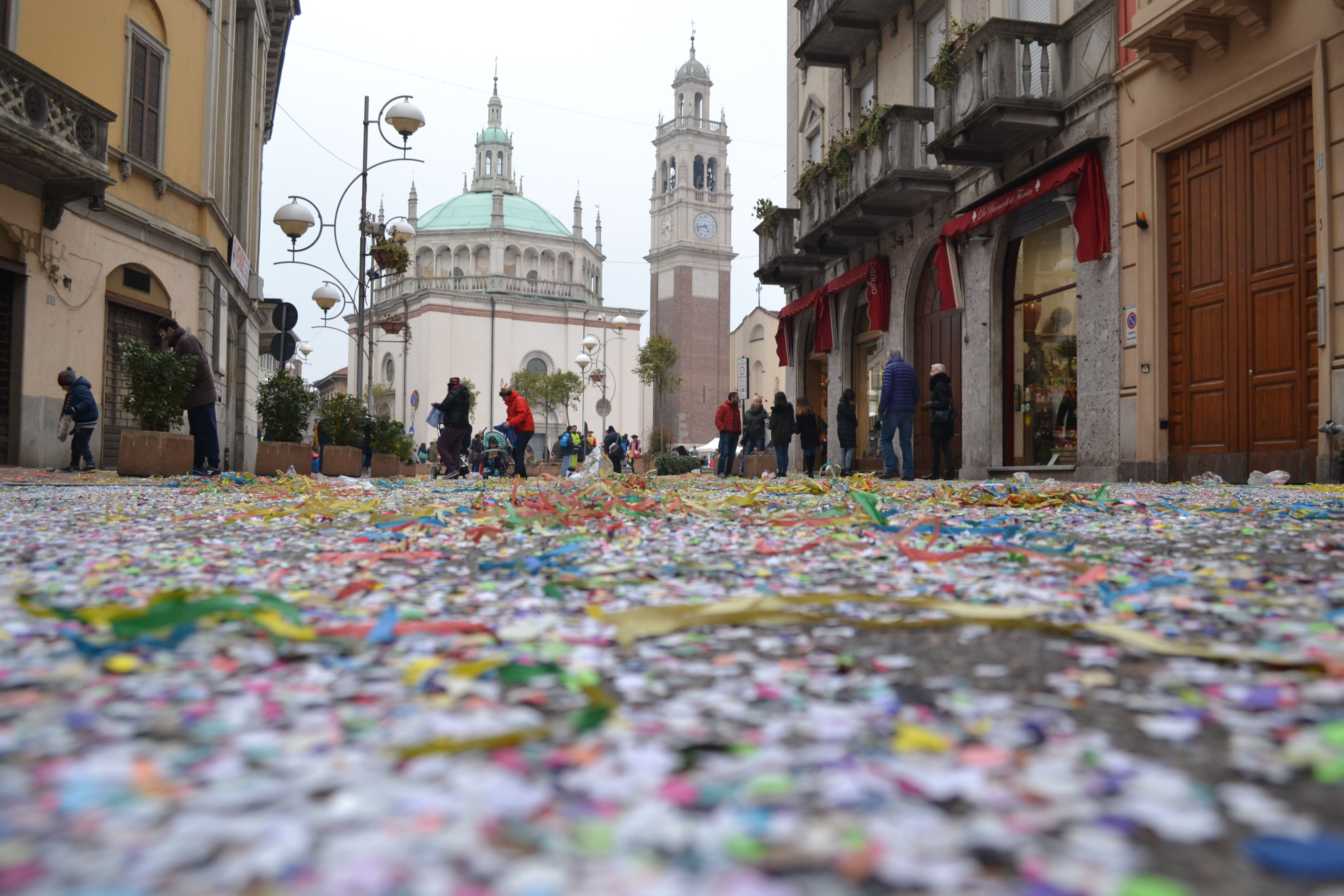 Carnevale Busto Arsizio 2018